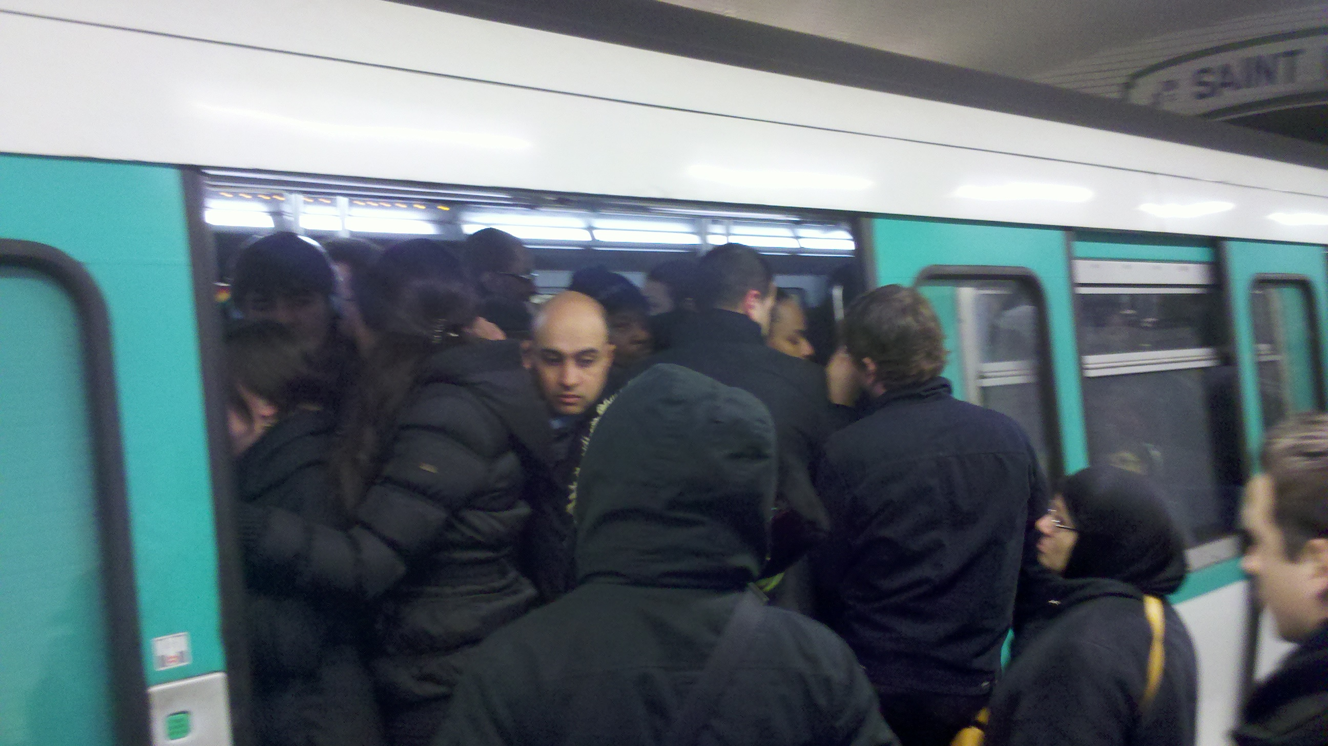 Saturation de la ligne 13 du metro de Paris. Photo prise à la station Porte de Saint-Ouen un jour d'incidents lié à la neige.